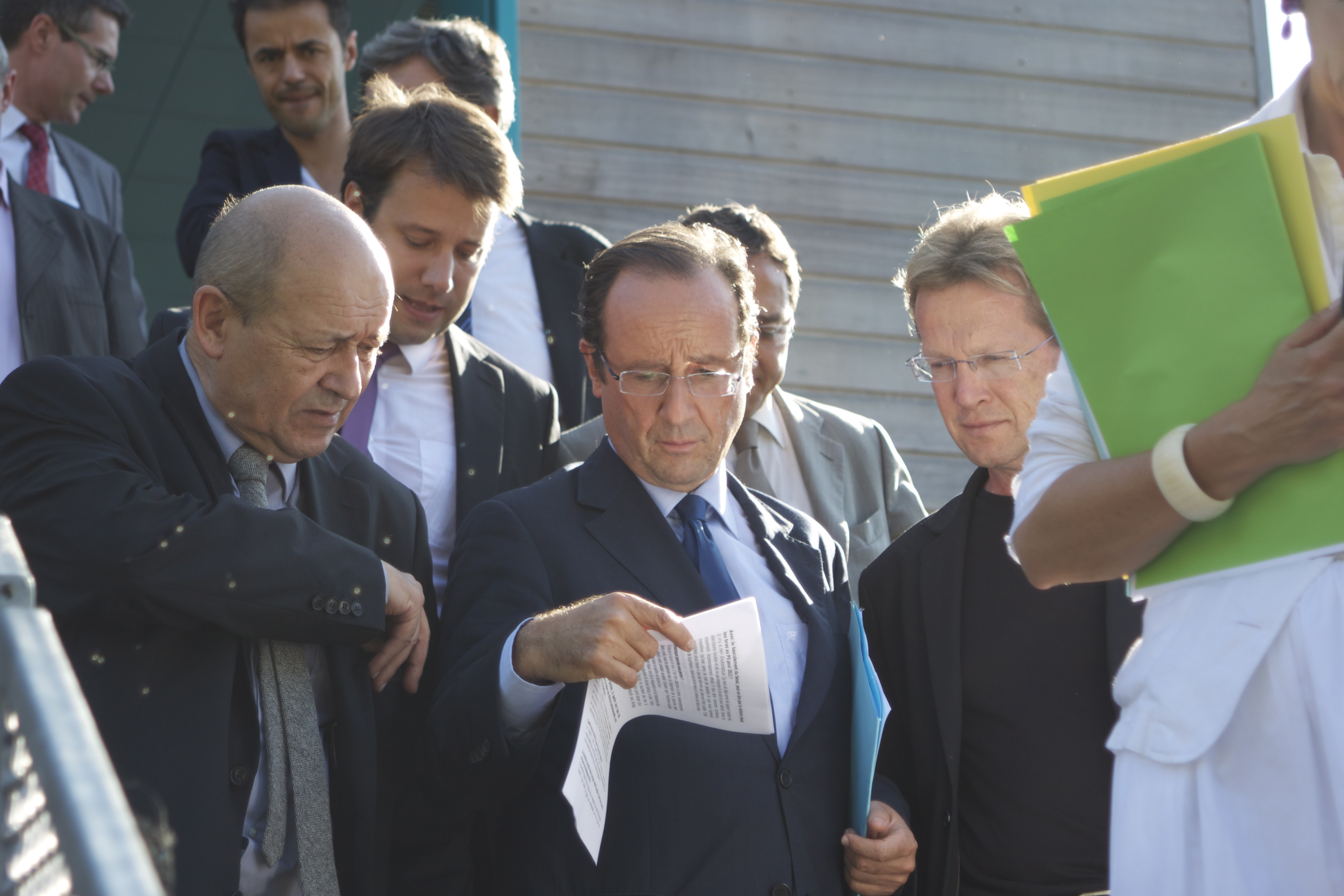 Venue François Hollande à Rennes le 27 septembre 2011, Jean-Yves Le Drian, Frédéric Bourcier, Loïg Chesnais-Girard